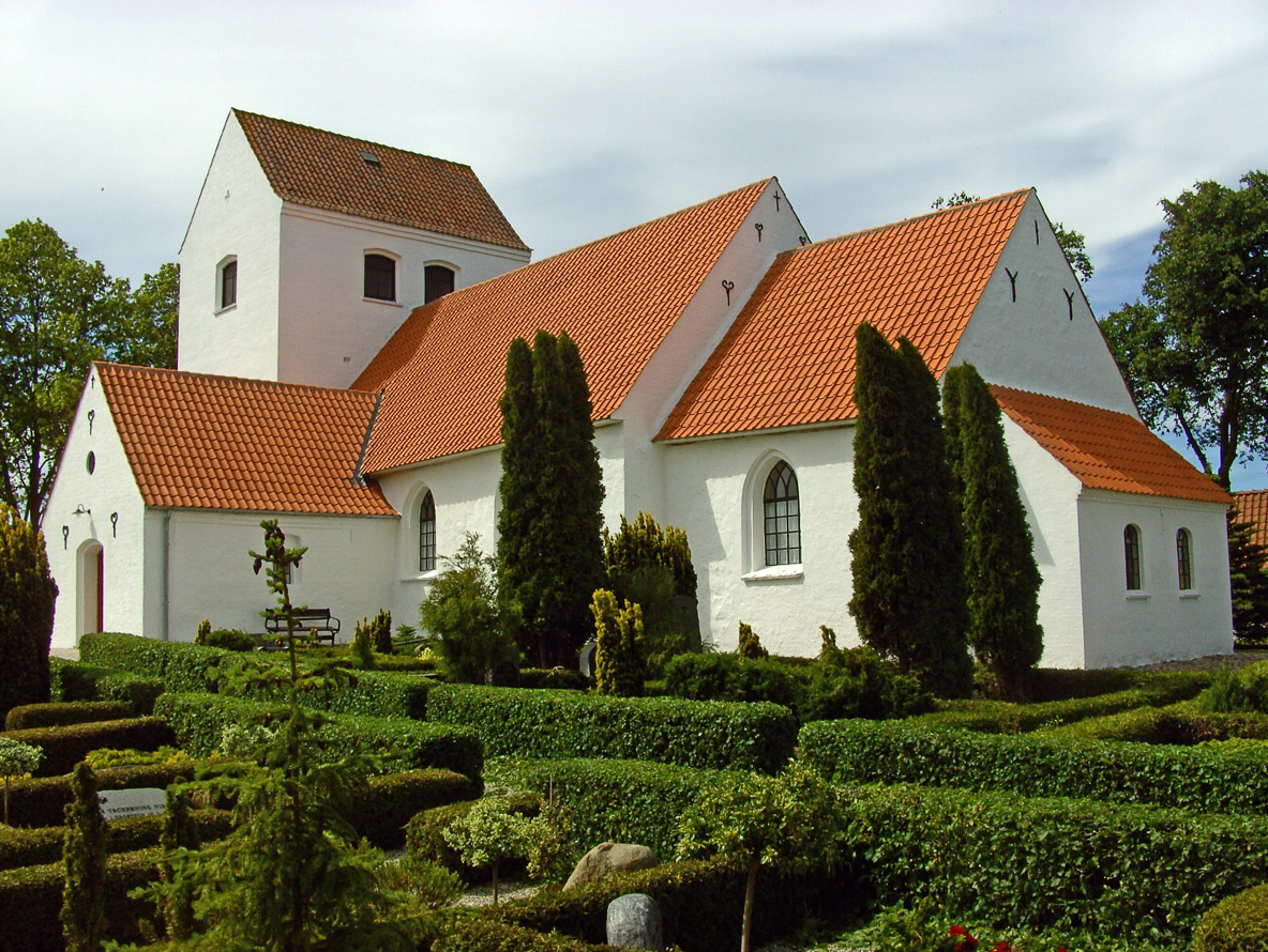 fra sydøst